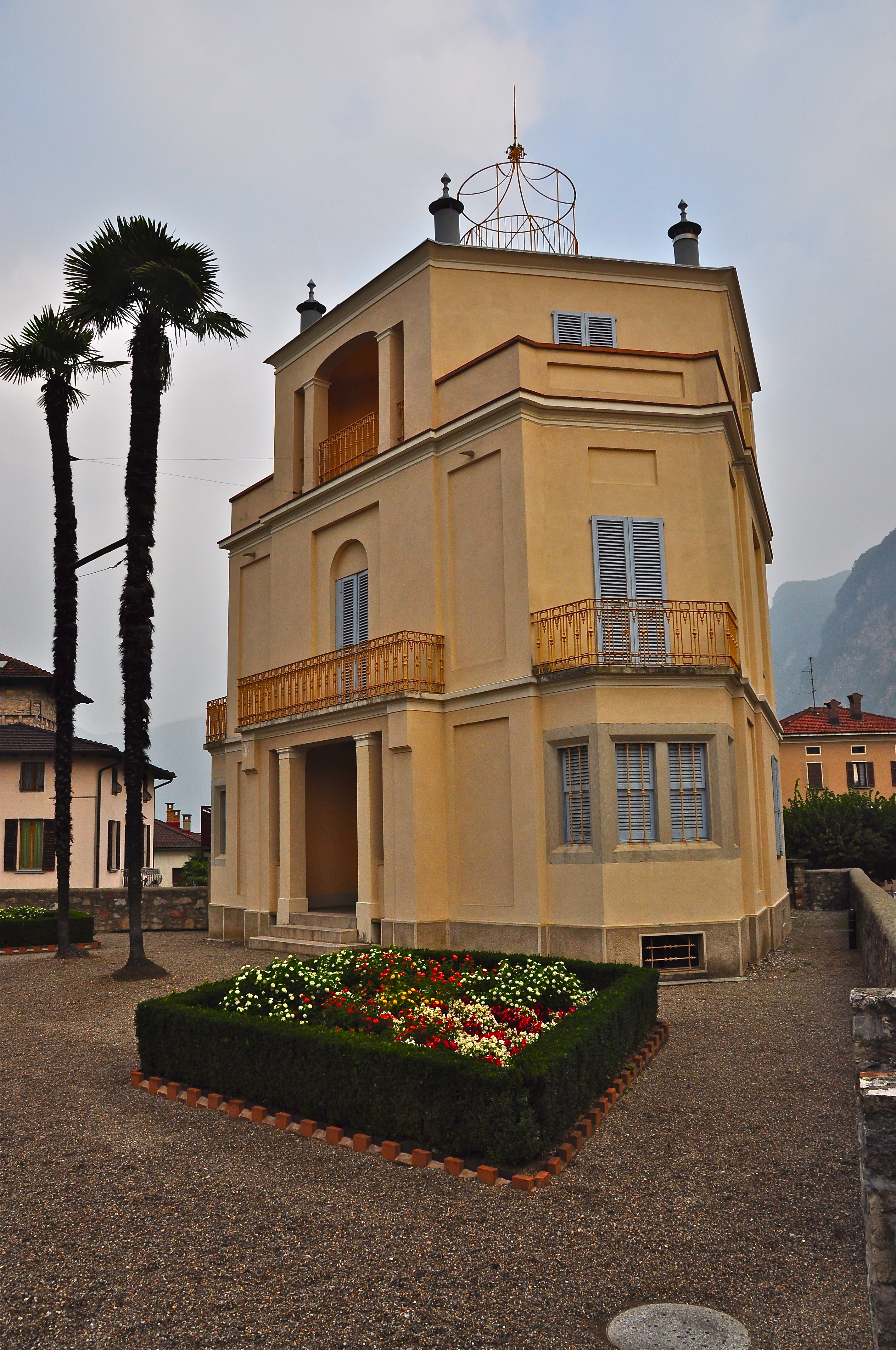 Costruzione a pianta centrale, opera dell'architetto Antonio Croci